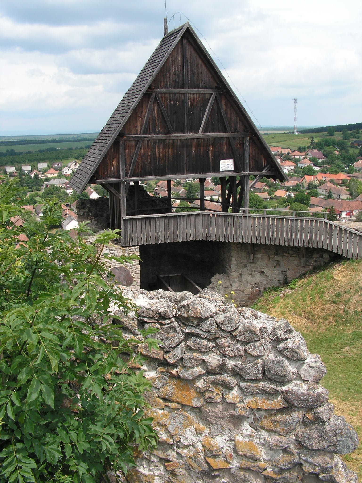 A vár keletkezését a XI. századra teszik. Kezdetben fagerendás kialakítású volt. A török kétszer is elfoglalta. Hanyatlása a toronyban tárolt puskapor felrobbanásakor kezdődött (1685), a belső vár teljesen megsemmisült. Ettől kezdve a vár anyagát szét hordták, az időjárás is kifejtette romboló hatását.